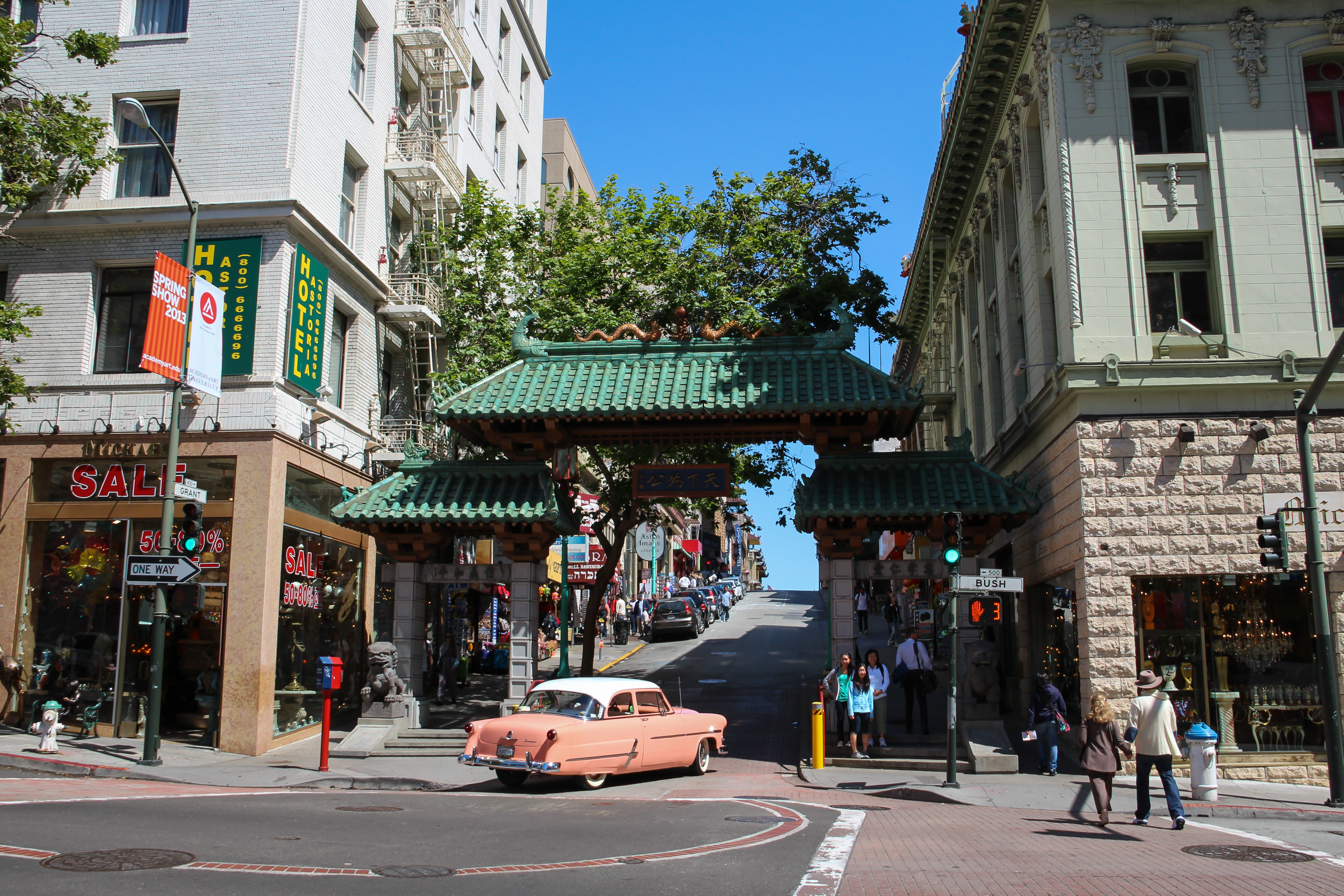 Dragon Gate, San Francisco